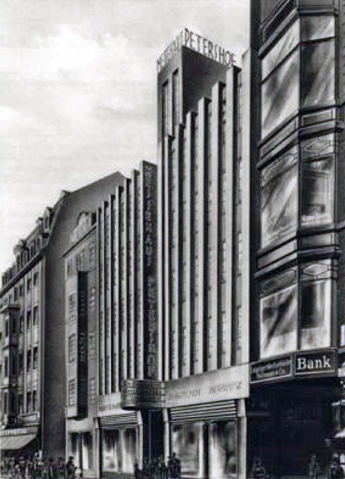 Nicht ausgeführter Entwurf für den Petershof in Leipzig (Werbeheft für den Bau Meßhaus Petershof Leipzig)